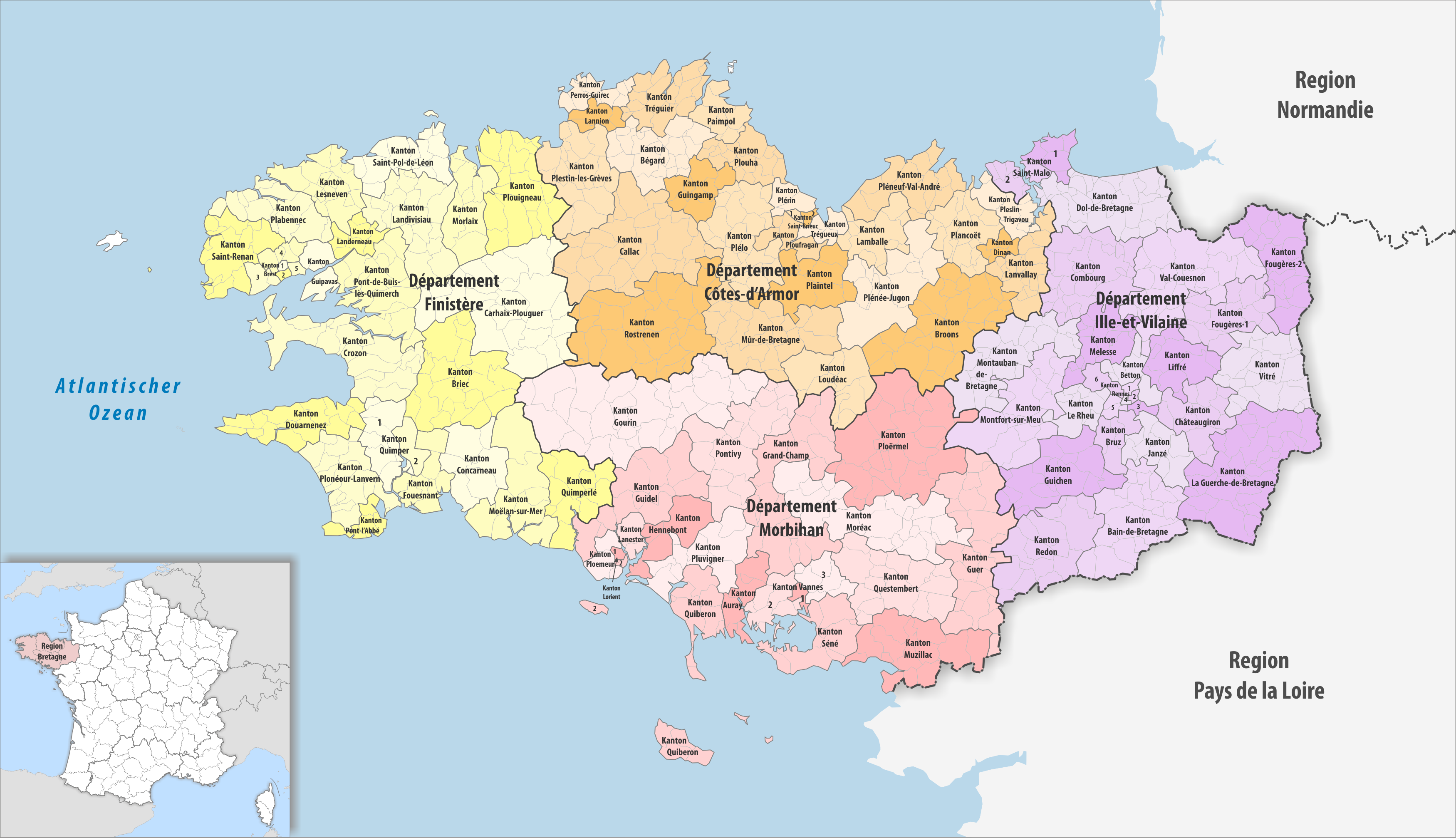 Gemeinden, Kantone und Departemente in der Region Bretagne